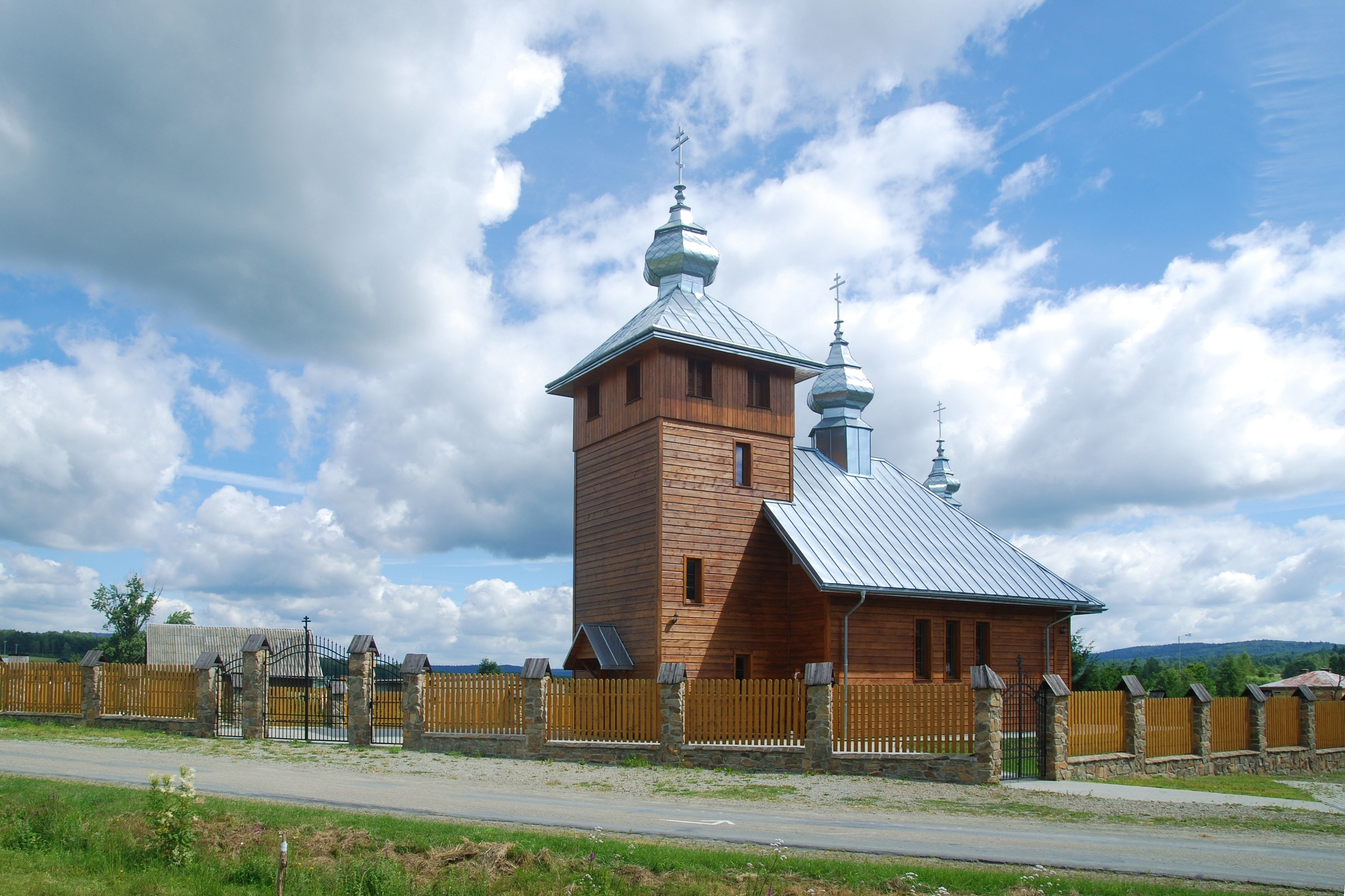 wieś Regetów